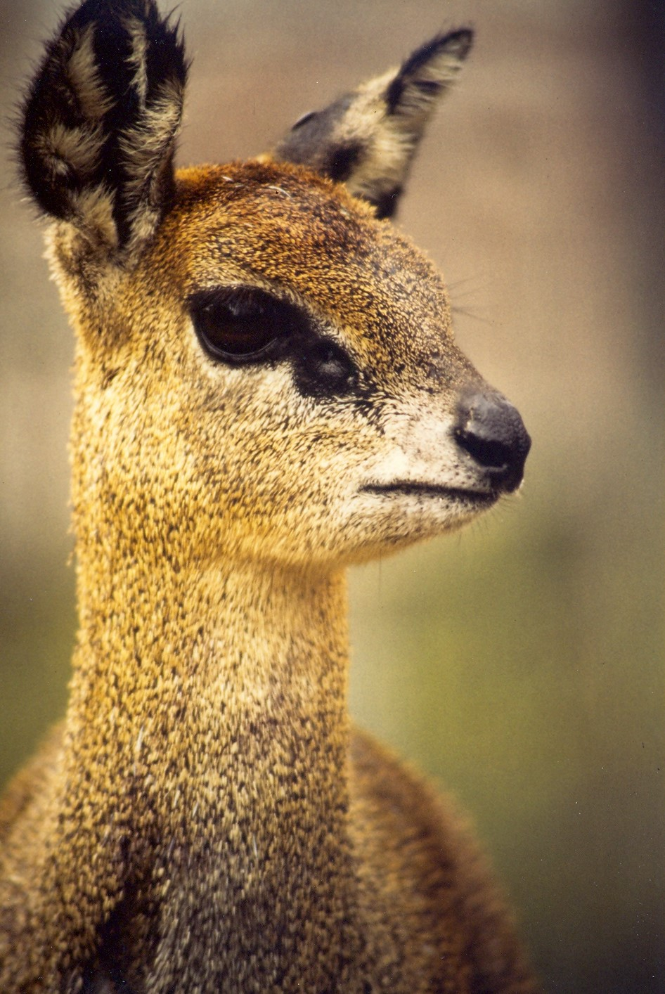 Klippspringer (Oreotragus oreotragus) - Frankfurter Zoo